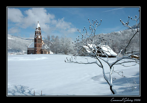 Description: L'Eglise de l'Emm à Metzeral après les chutes de neige du 4 mars 2006. Source: Photo: Emmanuel GUHRING Licence